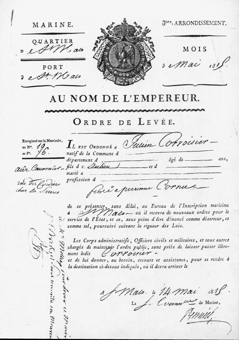 Passeport ou laissez-passer donné à un aide-canonnier de rejoindre le bureau de l'inscription maritime de Saint-Malo pour servir dans la marine en mai 1815. Dans la marge gauche, il est indiqué qu'il doit se rendre à Brest. (Cote 4 S 1084.)